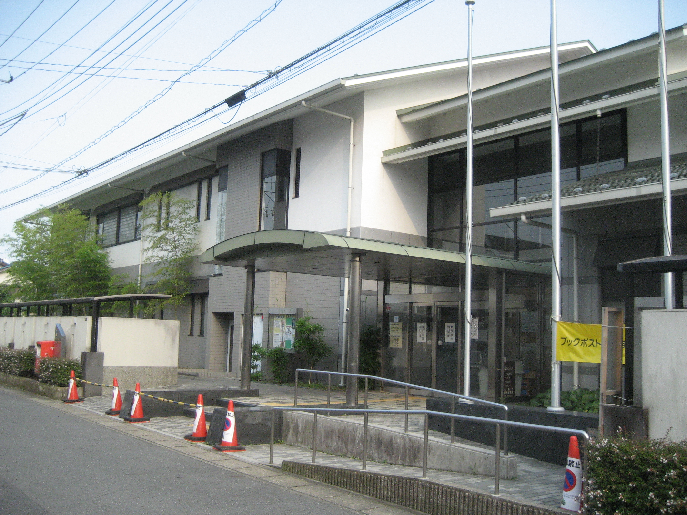 八潮市立八条公民館・図書館